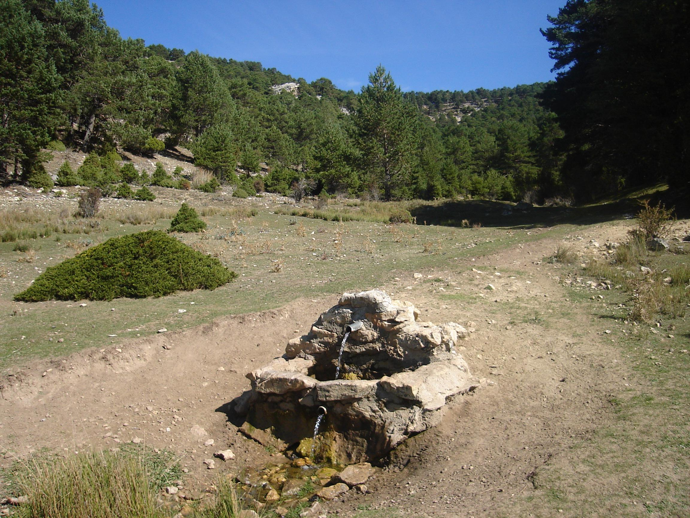 Fuente que da origen al rio Turia, conocido como rio Guadalaviar antes de Teruel.